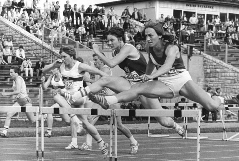 Kerstin Claus, Johanna Klier, Gudrun Wakan ADN-ZB Franke 9-7-80 Berlin: DDR-offenes Leichtathetik-Sportfest im Jahn-Sportpark- Über 100-Meter Hürden der Frauen siegte Kerstin Claus (449) in 12,71 sec. (SC DHfK Leipzig) vor Johanna Klier (rechts -383) (SC Turbine Erfurt) und Gudrun Wakan (417) vom SC Chemie Halle.-siehe ADN-Meldg.